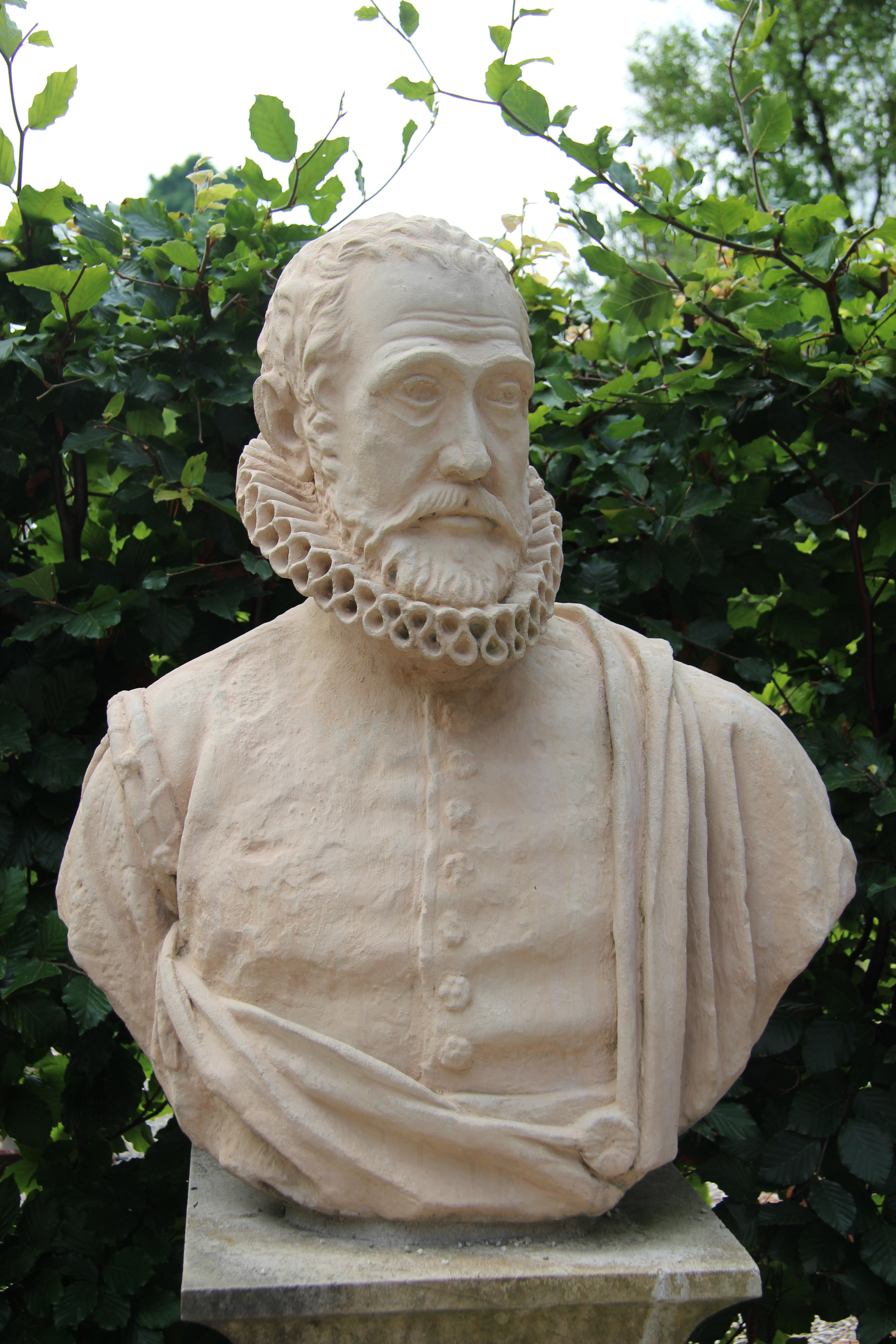 Borstbeeld Clusius in Hortus Leiden (replica). Icones Leidenses 20